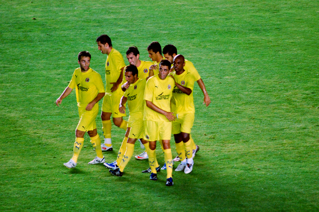 El Vila-real celebrant un gol, en un amistós en pretemporada davant el Nàstic.